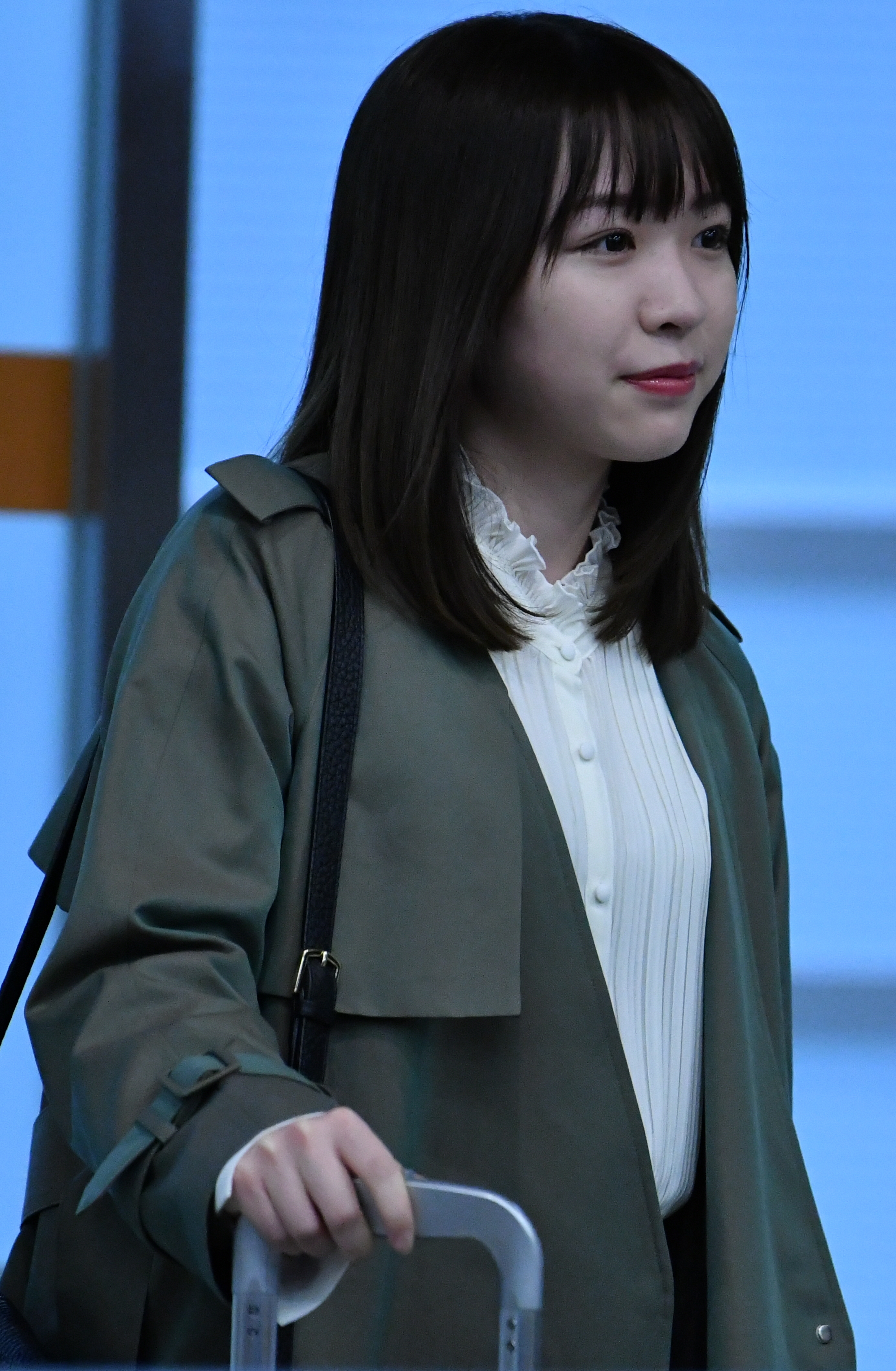 乃木坂46成員在台北國際松山機場。